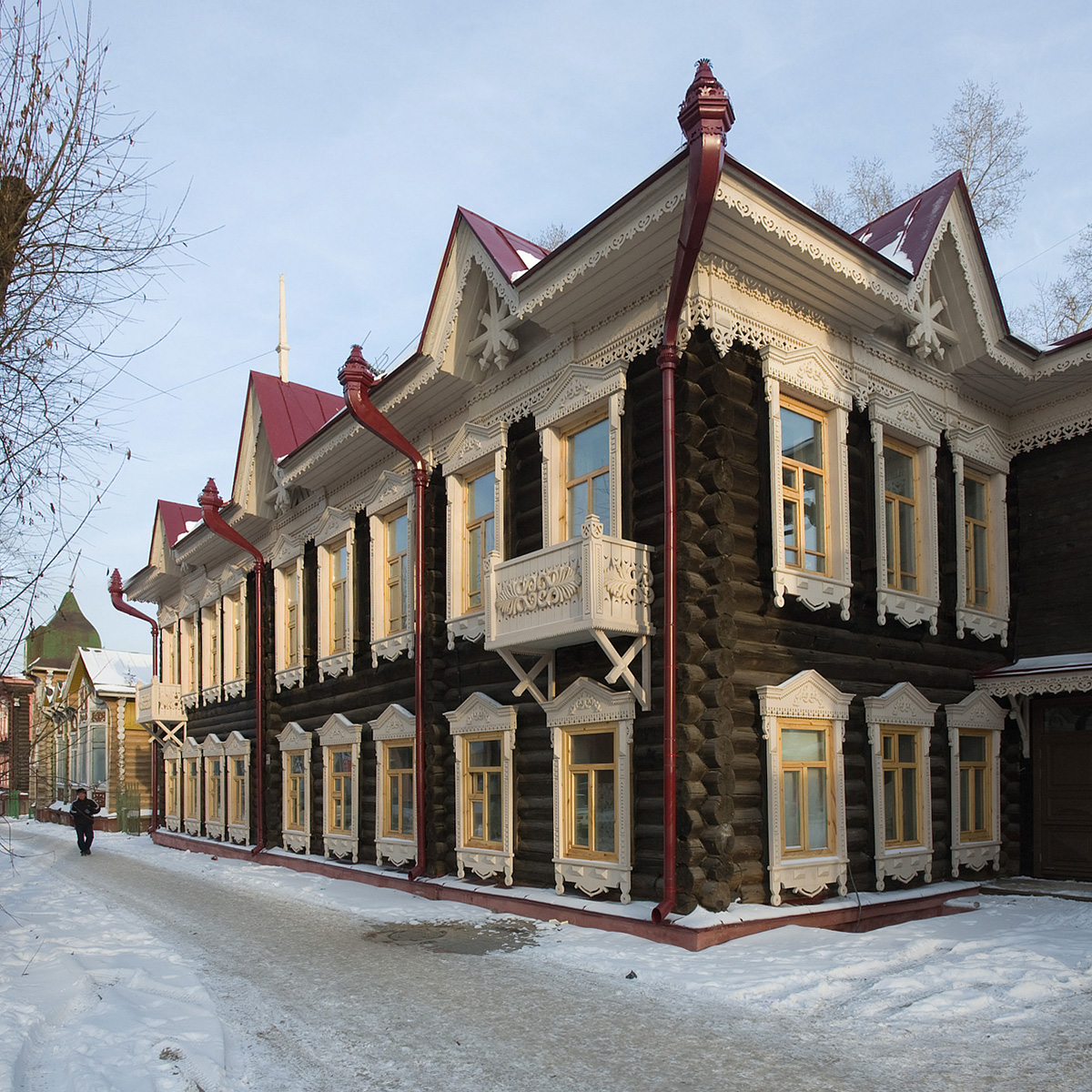 улица Гагарина (Томск), д. 44